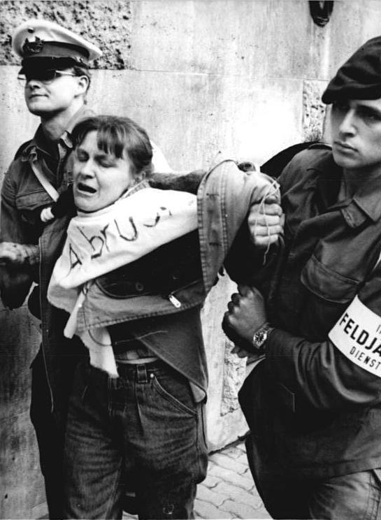 ADN- Ralf Hirschberger 19.10.90 Bad Salzungen: Vereidigung- Am Rande der Vereidigung der ersten Bundeswehrsoldaten aus dem Osten Deutschlands wurde die ehemalige VK-Abgeordnete vom Bündnis 90-Grüne, Christine Grabe, abgeführt, als sie ihren Protest ausdrücken wollte.